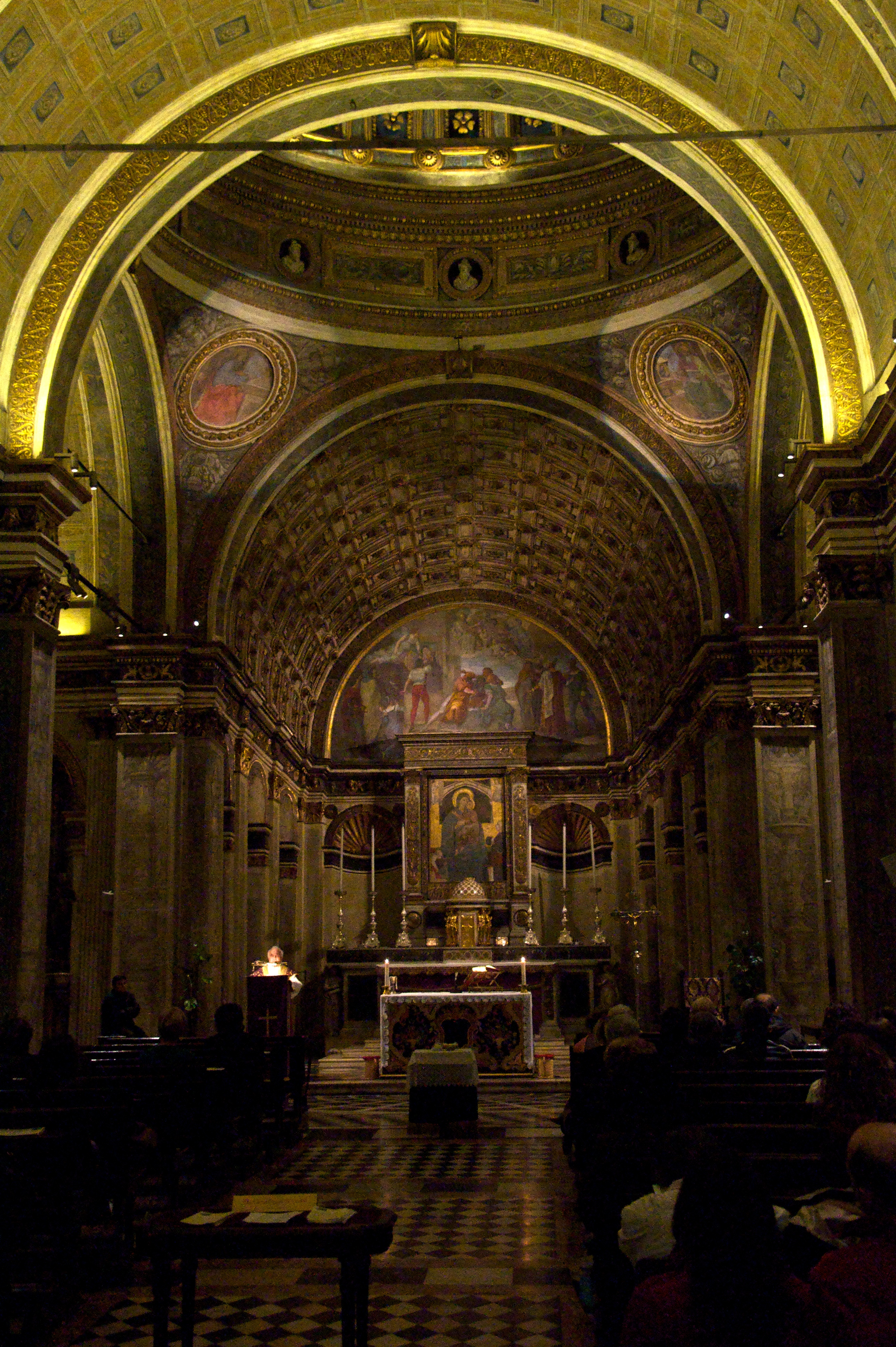 Santa Maria presso San Satiro Milano